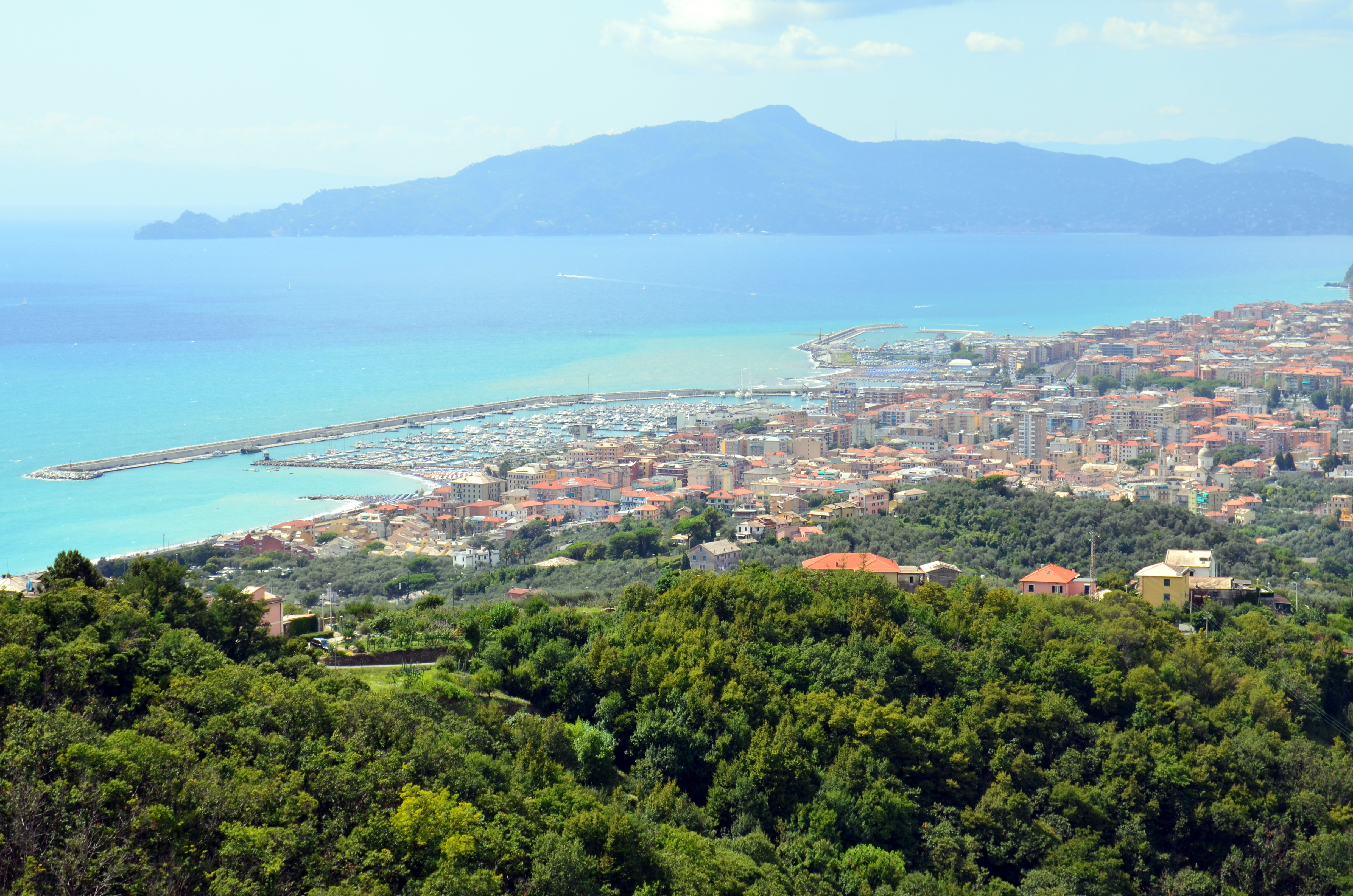 Panorama delle città di Lavagna e di Chiavari dalla frazione lavagnese di Santa Giulia, Lavagna, Liguria, Italia